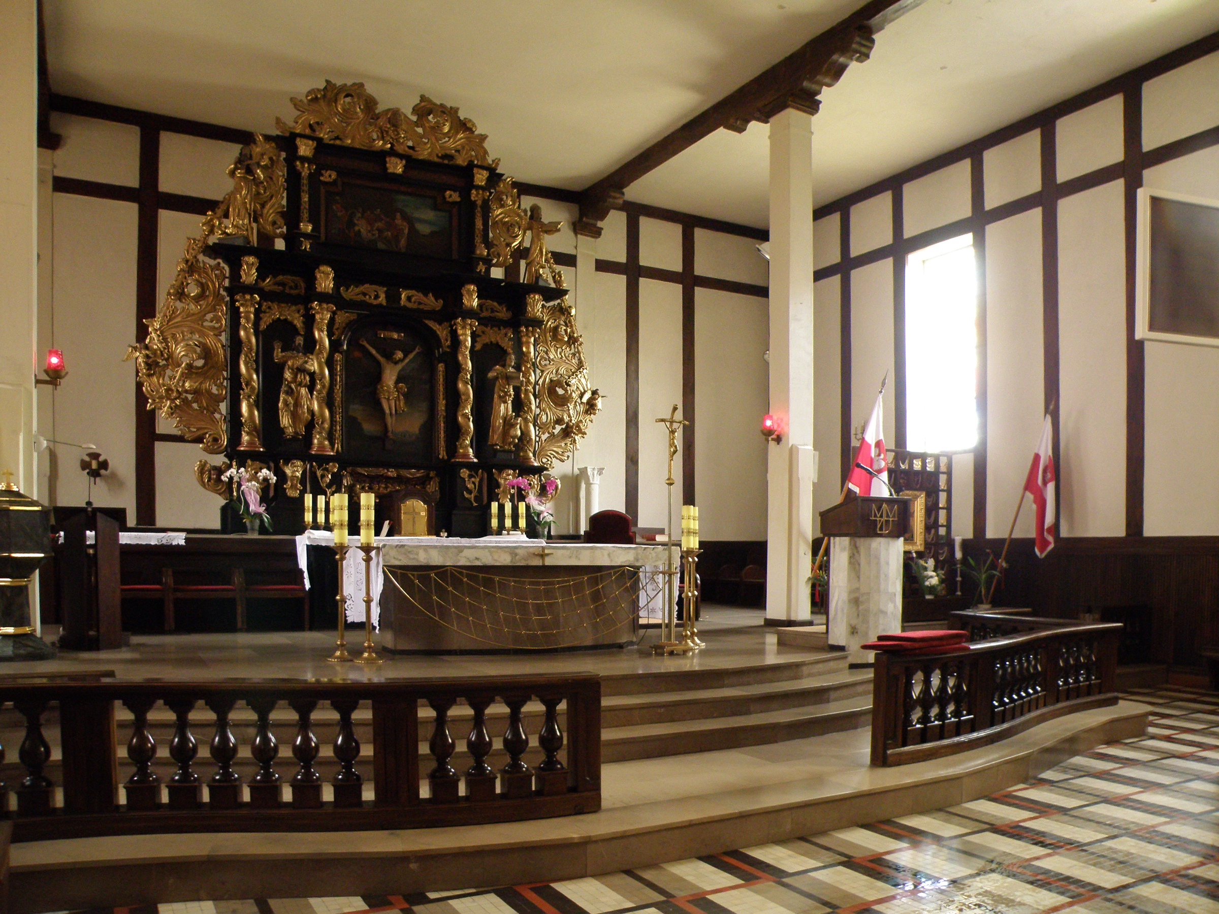 Polska, Pisz - Rzymskokatolicki Kościół Parafialny św. Jana Chrzciciela. Zabytek wpisany pod nr A-472 do rejestru zabytków województwa warmińsko-mazurskiego. This photo of Warmian-Masurian Voivodeship was taken during Wikiexpedition 2012 set up by Wikimedia Polska Association.You can see all photographs in category Wikiekspedycja 2012. The making of this document was supported by Wikimedia Polska.